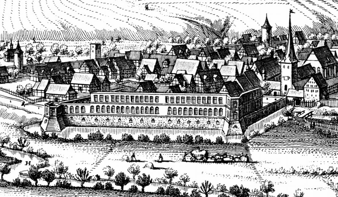 Uslar. Ruine von Schloß Freudenthal. Detail aus "Uslar-1654-Merian.jpg"-Datei.